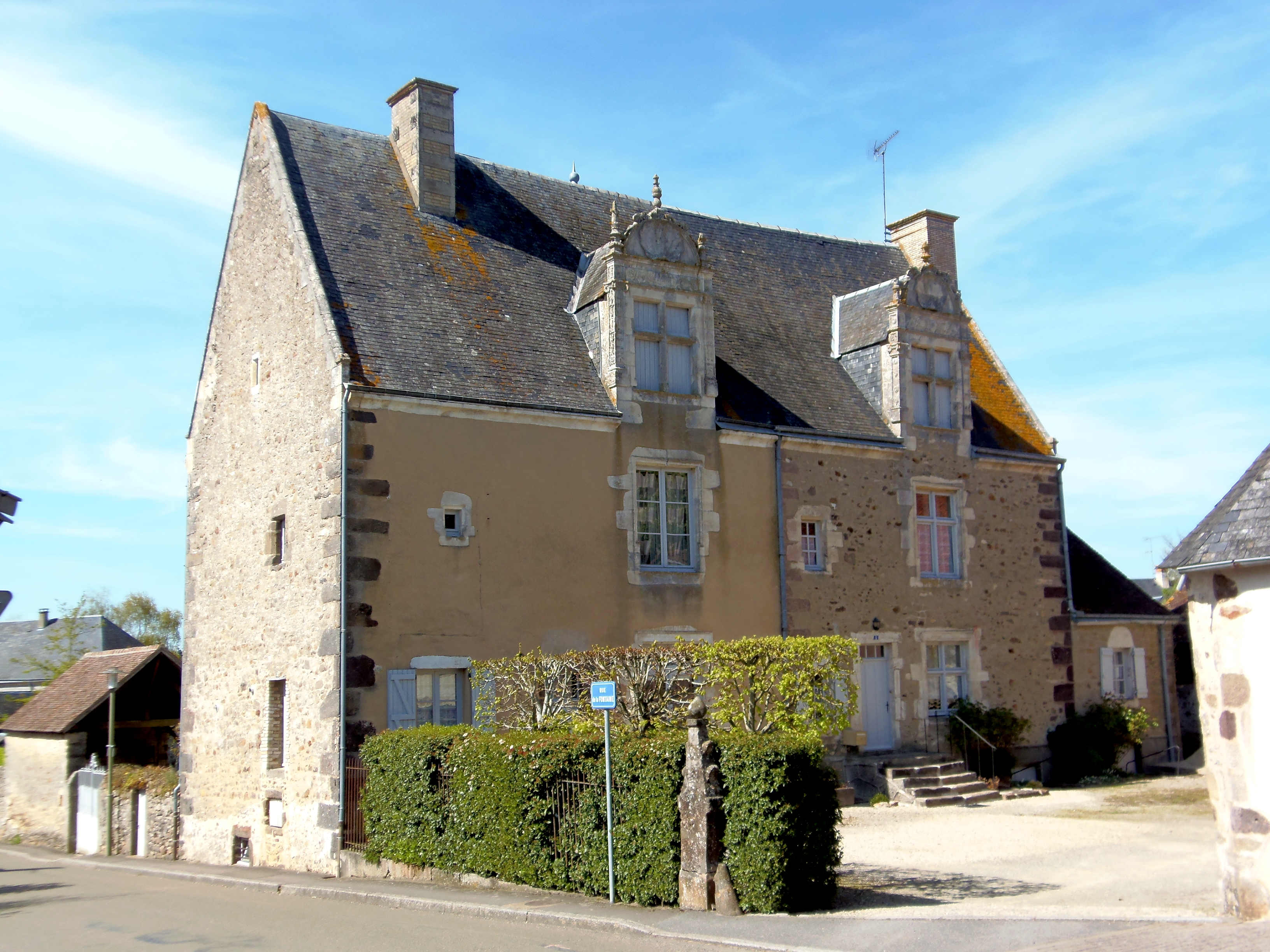 Sougé-le-Ganelon (Pays de la Loire, France). Le prieuré Saint-Martin.